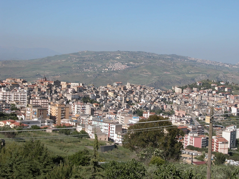 Panorama di Casteltermini (AG)